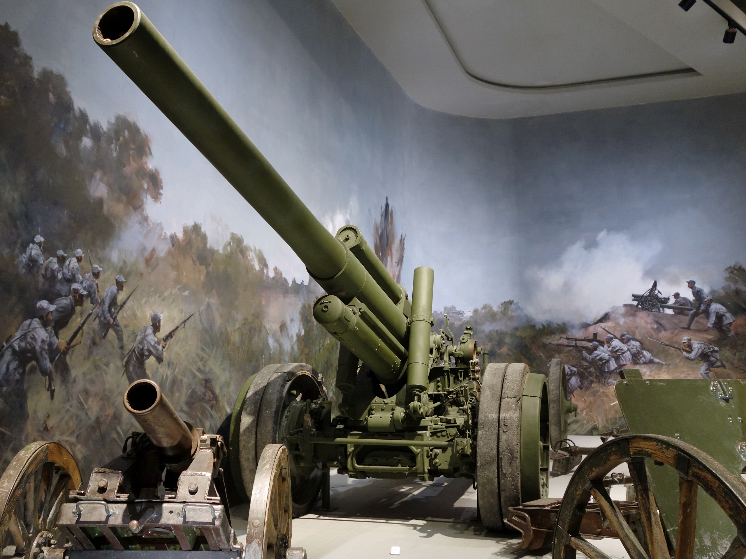 德国造FH18型32倍口径150毫米榴弹炮（莱茵金属FH-18 32/L），保存在中国人民革命军事博物馆。